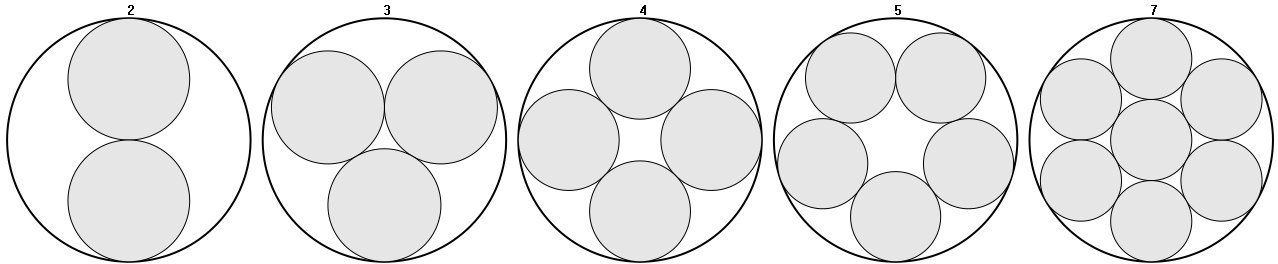 Schéma des configurations de 5 cercles avec respectivement 2,3,4,5 et 7 cercles inscrits.